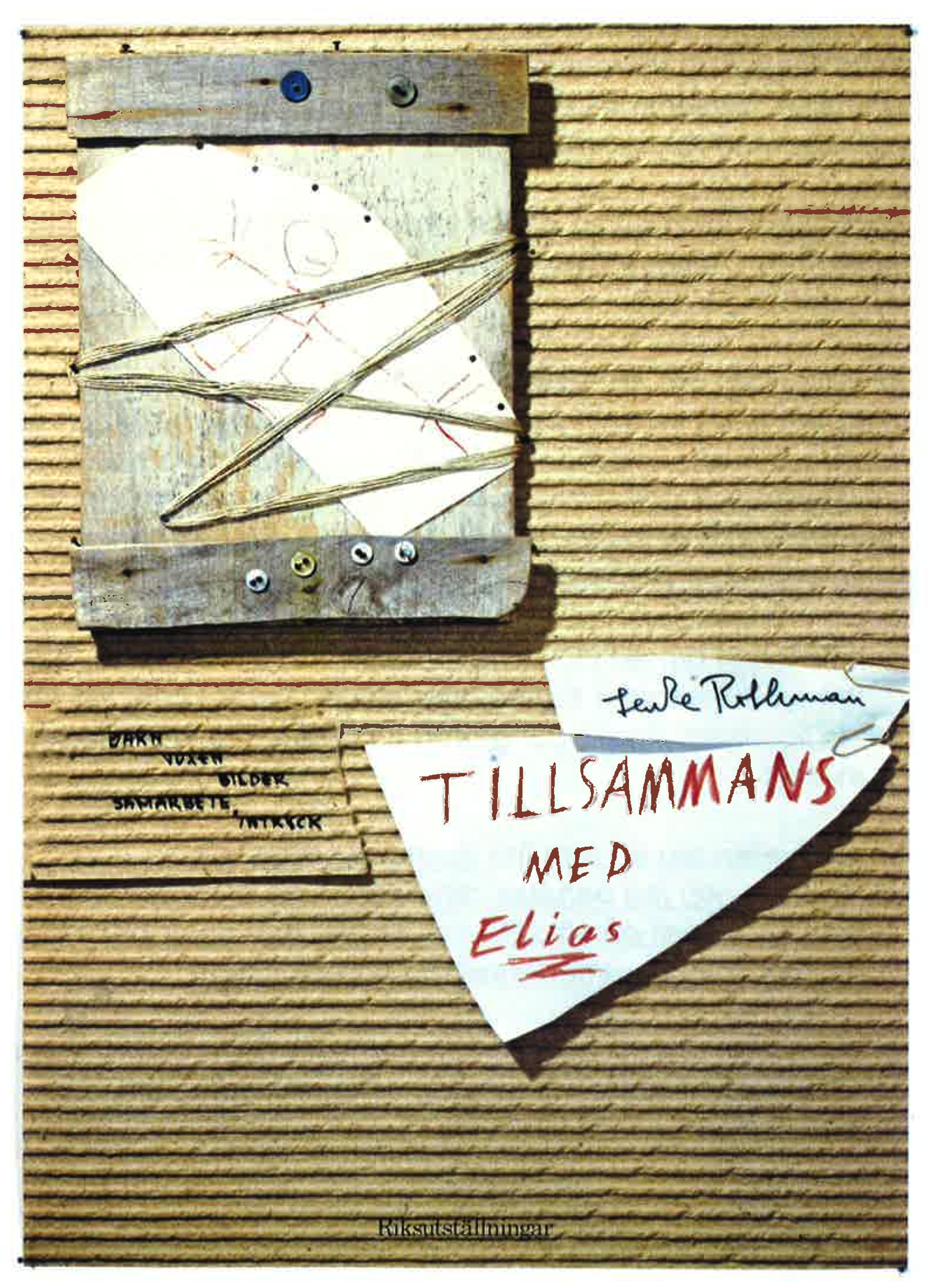 Affisch från utställningen "Tillsammans med Elias" som Lenke Rothman gjorde tillsammans med Riksutställningar.